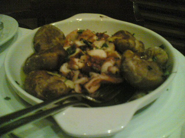 "Polvo à lagareiro", a portuguese octupus recipe